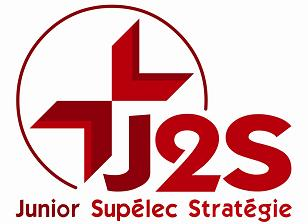 Logo de Junior Supélec Stratégie